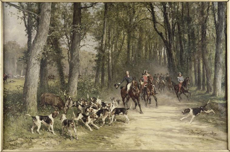 Le duc d'Orléans, chassant à courre au Bosquet de Sylvie en 1841 par Charles Olivier de Penne (1886), huile sur toile, 77 x 117 cm